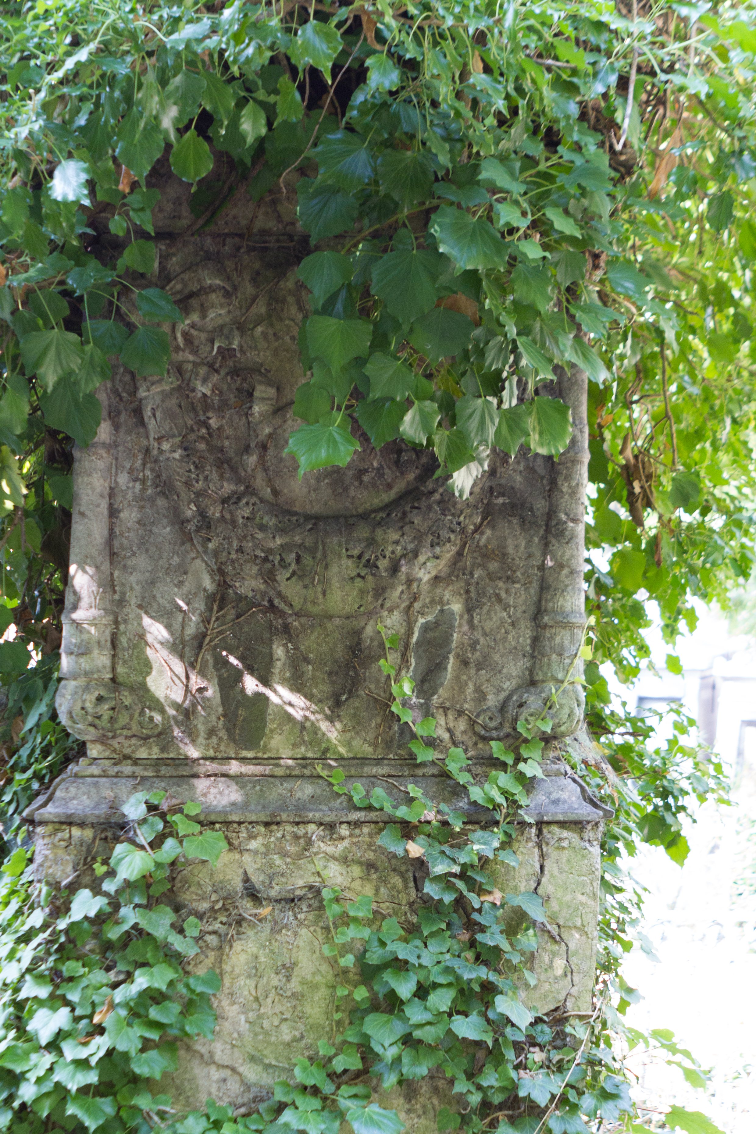 Sépulture de Richard Chenevix (1771-1830), chimiste irlandais.